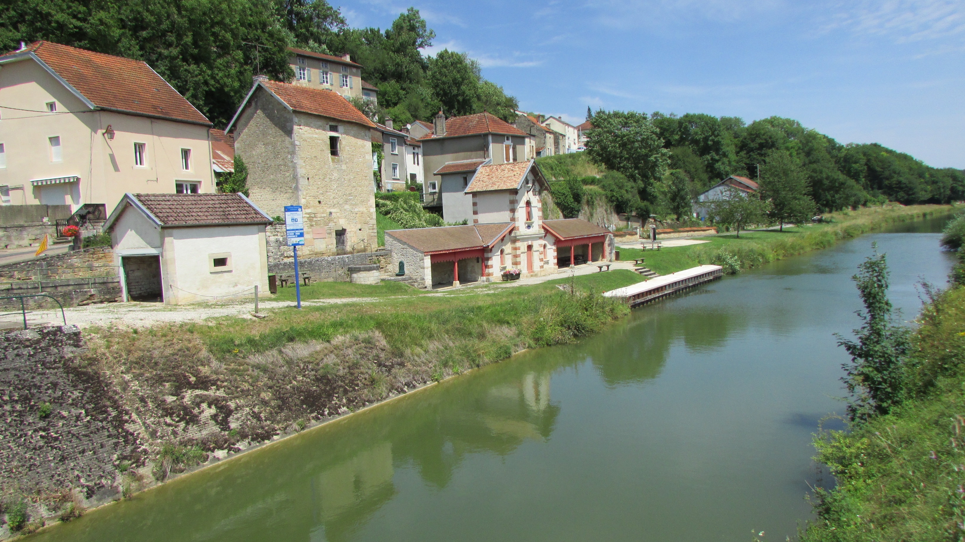 Le canal entre Champagne et-Bourgogne à Riaucourt